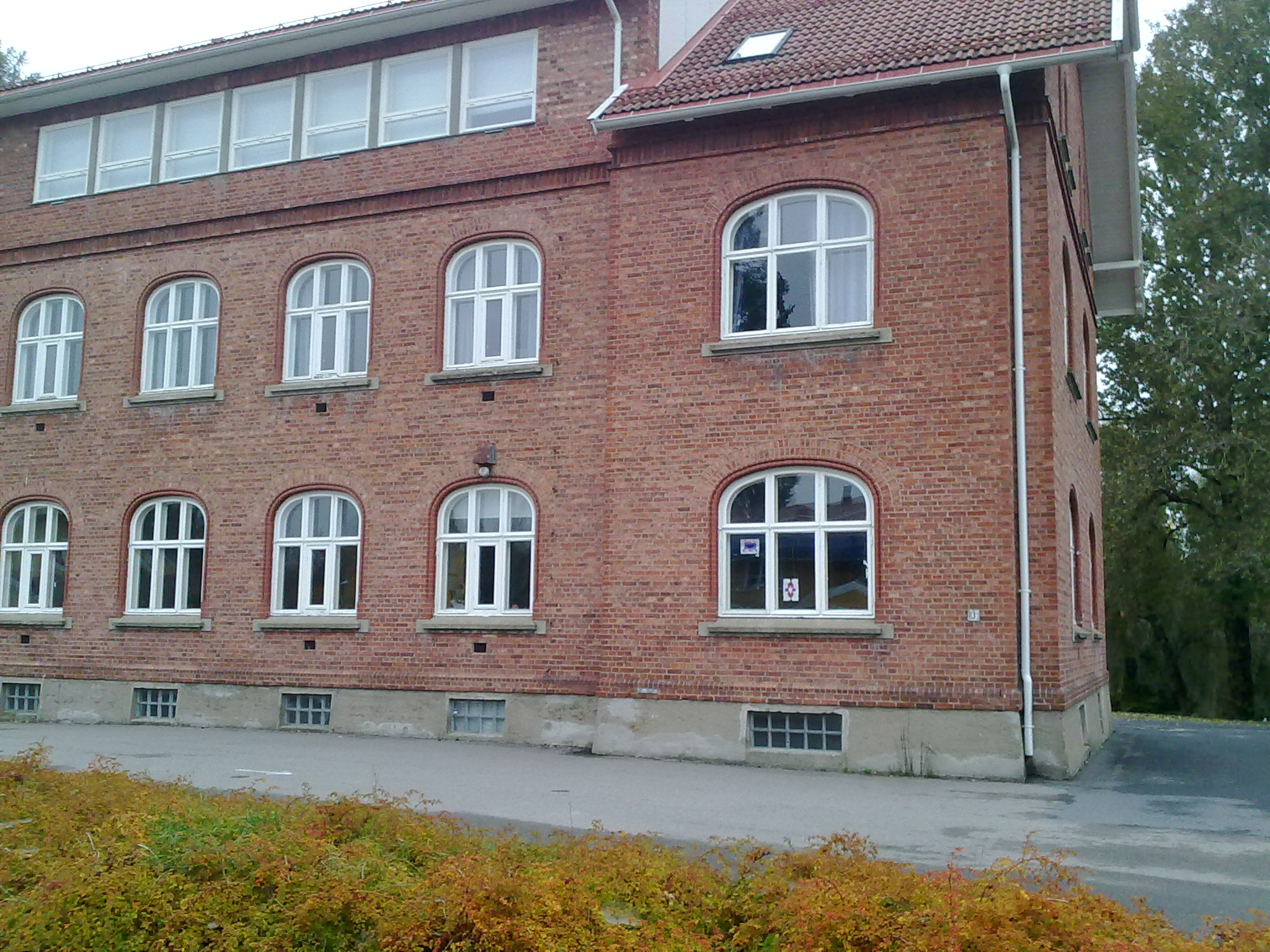 Gamle Åsgård skole, også kalt rødskolen.